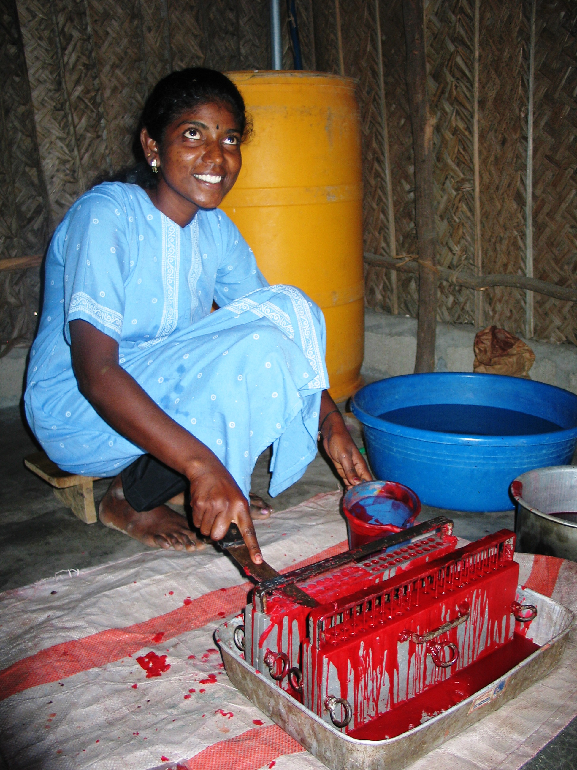 Candle making in Sri Lanka 2005. Photo: AusAID